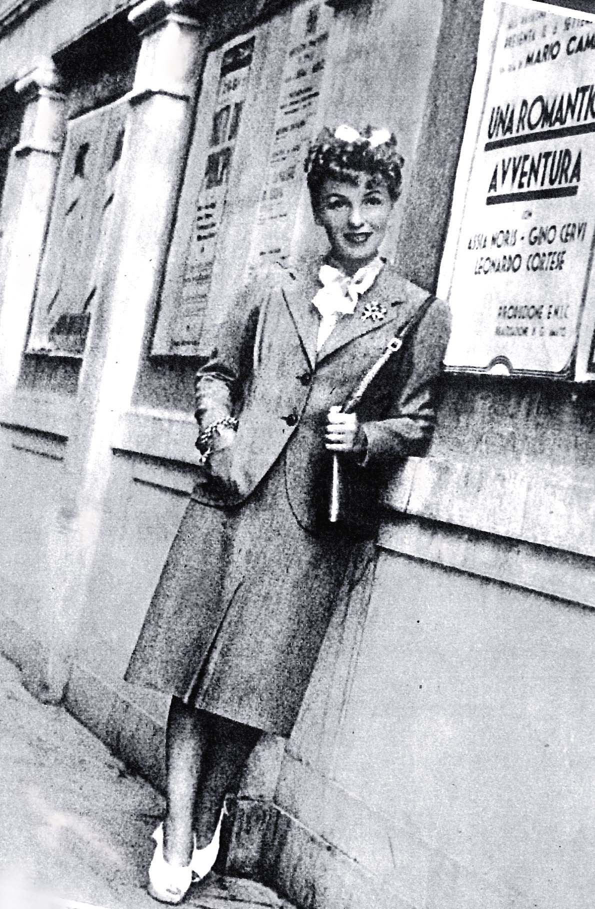 Assia Noris alla presentazione di "Una romantica avventura" (Camerini, 1940) alla Mostra di Venezia - sett. 1940